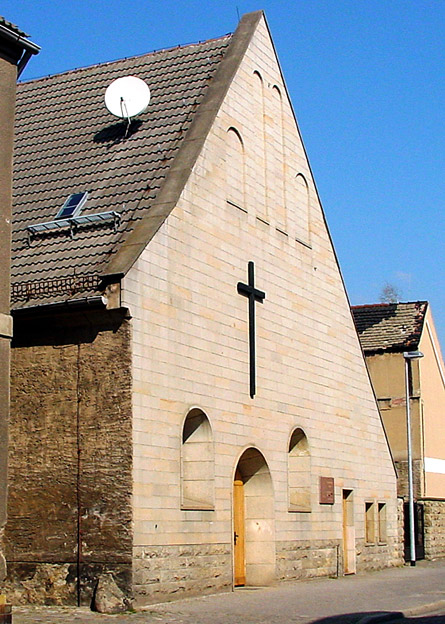 Neuapostolische Kirche, ehemals Heilig-Geist-Kirche Calbe